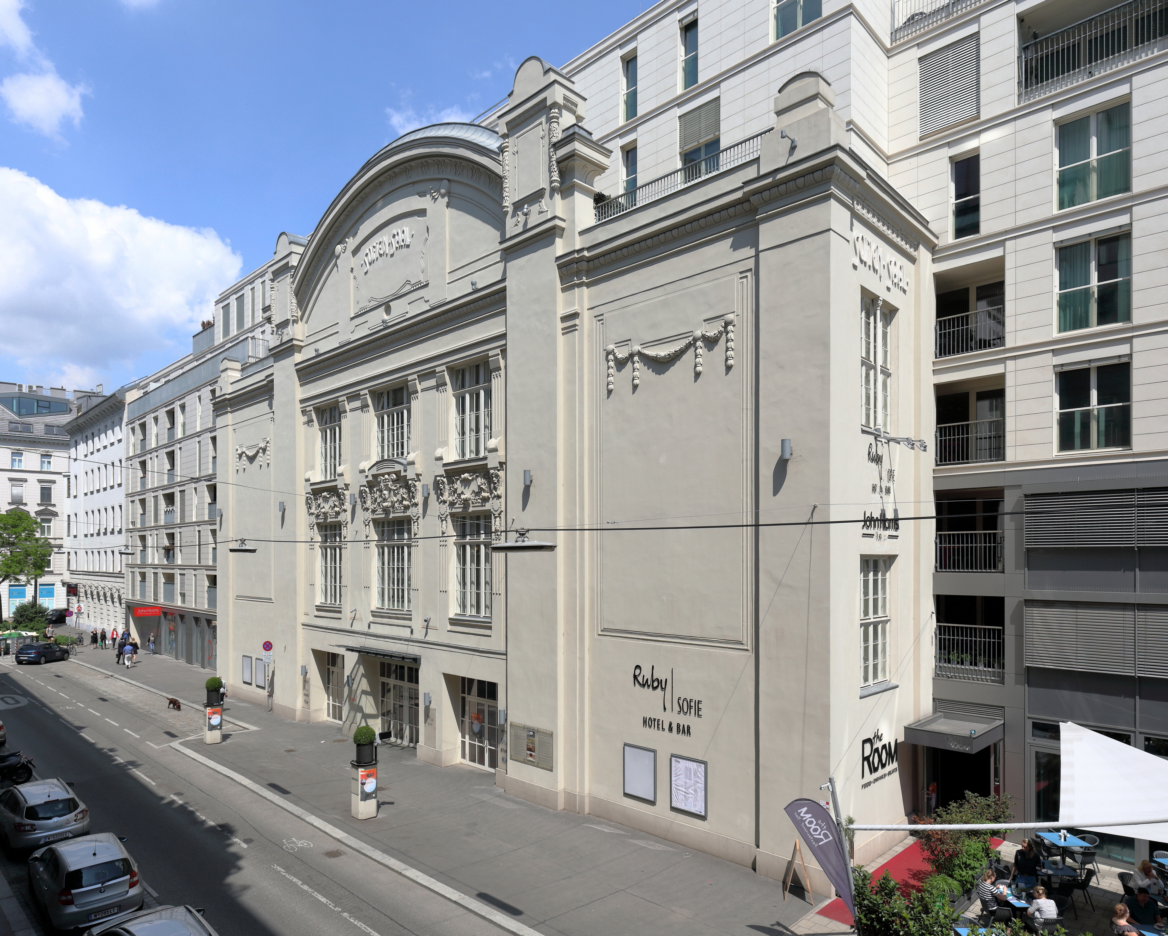 Die Hauptfassade der ehemaligen Sofiensäle im 3. Wiener Gemeindebezirk Landstraße.Das Gebäude wurden von 1845 bis 1849 nach Plänen von Eduard van der Nüll und August Sicard von Sicardsburg als „Sophienbad“ (benannt nach der Erzherzogin Sophie) errichtet, dessen Schwimmhalle im Winter als Ballsaal genutzt wurde. Es wurde mehrfach um- und ausgebaut. Von 1898 bis 1899 wurde die Hauptfassade von dem Architekten Ernst Gotthilf-Miskolczy im secessionistischen Stil neu gestaltet. 1909 erfolgte die Einstellung des Badebetriebs und das Gebäude wurde nur mehr für Bälle, Konzerte und Veranstaltungen genutzt. Am 16. August 2001 brannten die Sofiensäle zur Gänze ab. Um 2010 erfolgte ein Neubau mit rd. 65 Wohnungen, etwa 125 Tiefgaragenplätze, einem Festsaal mit rd. 700 m², einer Bar mit 160 m² und einem Salon mit 170 m², wobei die alte Hauptfassade in den Neubau integriert wurde.